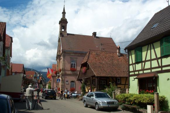 Fête du village à Goxwiller